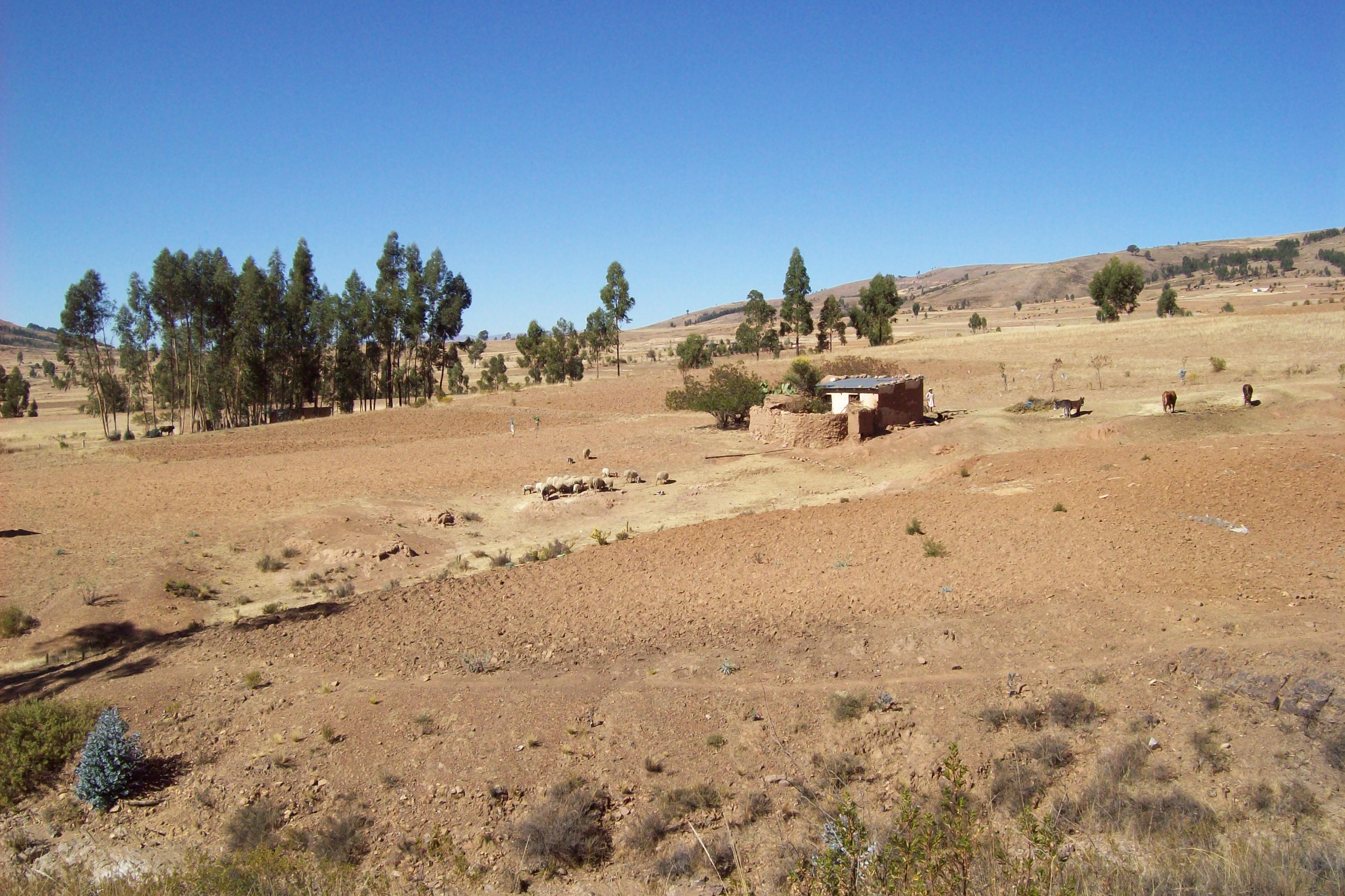 Agriculture in Bolivia.